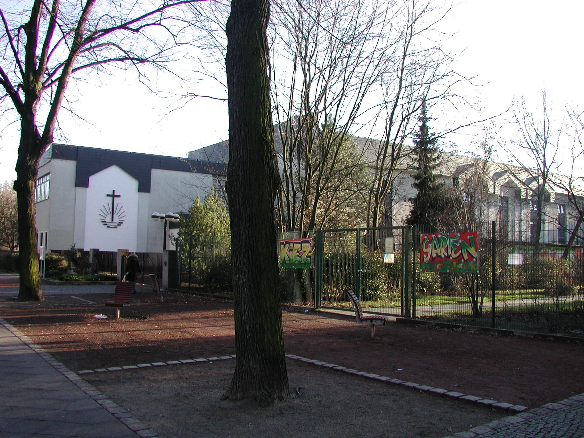 Neuapostolische Kirche, Blick von der Münsterlandstraße in Berlin-Lichtenberg